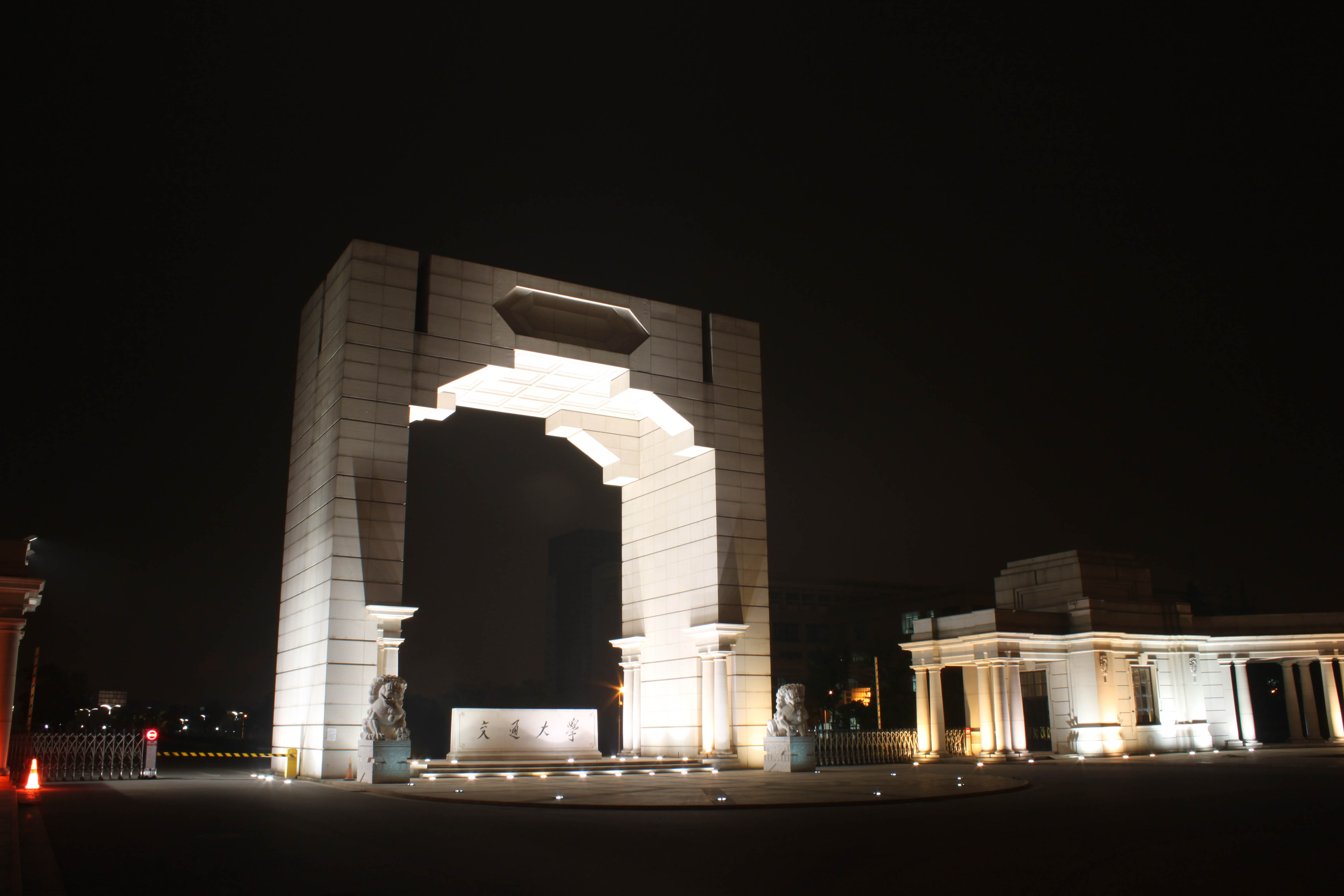 上海交通大学南二门“凯旋门”